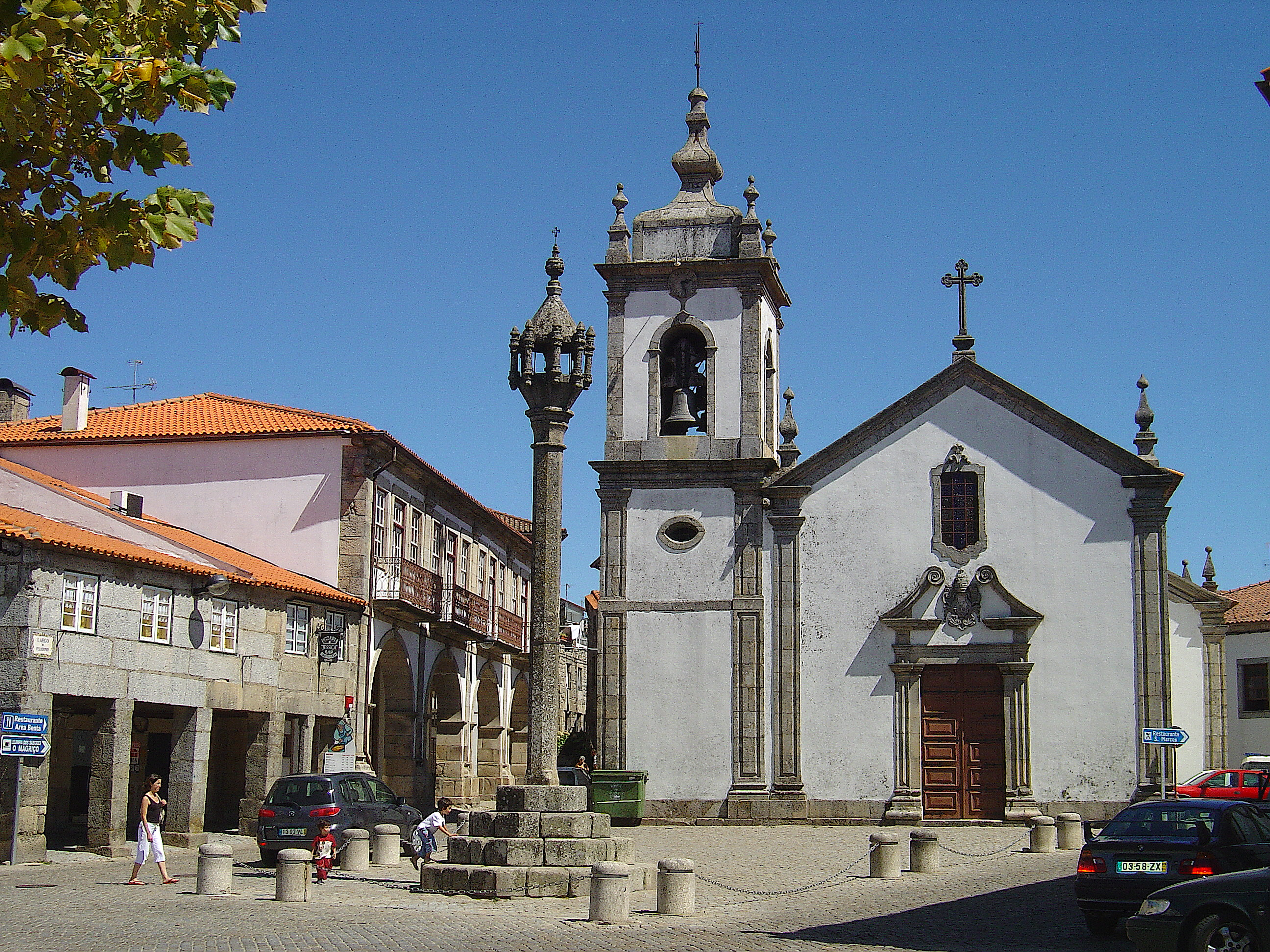 Trancoso Fotografia de Vitor Oliveira, integrada na colecção com o endereço